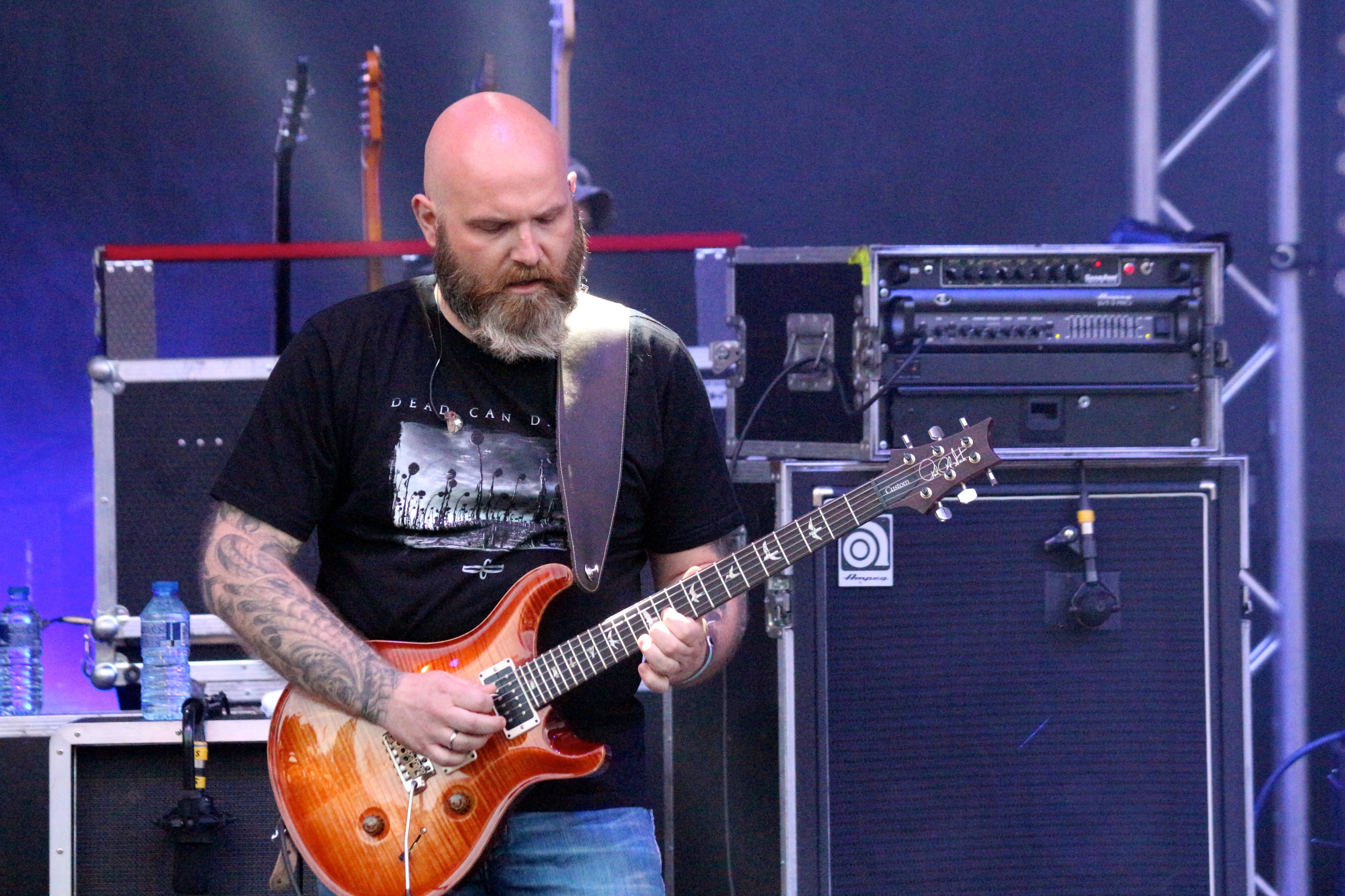 Riverside (rock/métal progressif, Pologne) au Night of the Prog Festival 2015, 18 juillet 2015, Loreley Freilichtbuhne